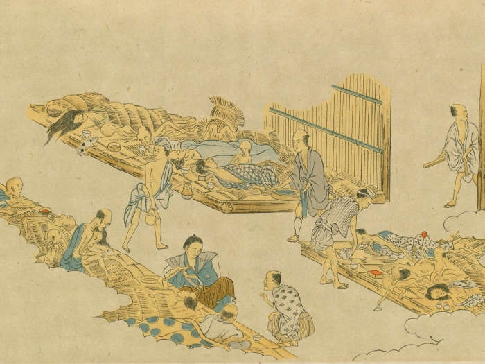 天保の飢饉飢饉の際、救小屋に収容され保護を受ける罹災民を描いたもの。渡辺崋山画『荒歳流民救恤図。